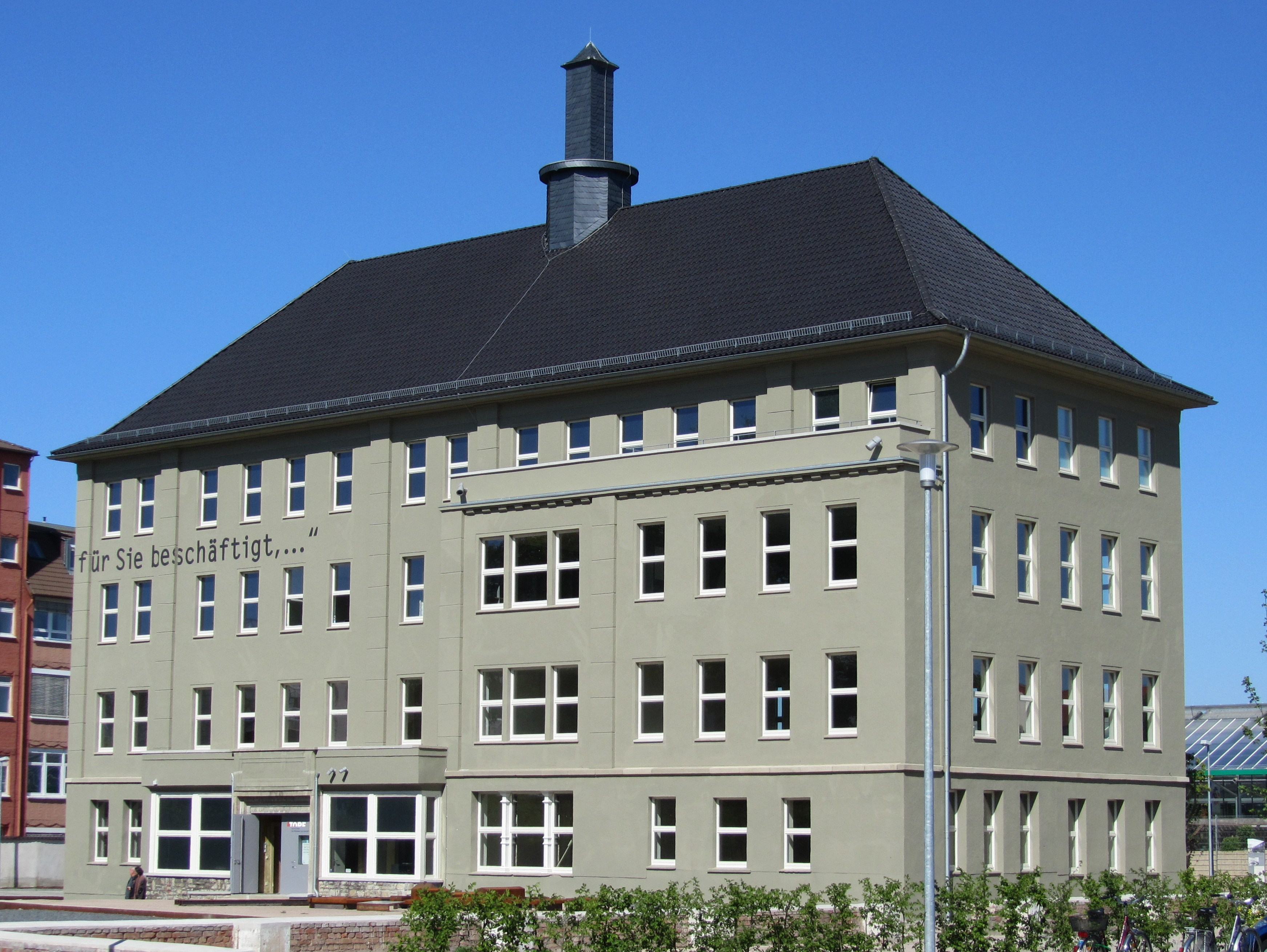 Das ehemalige Verwaltungsgebäude (seit 2011 Gedenkstätte) von Topf und Söhne in Erfurt.